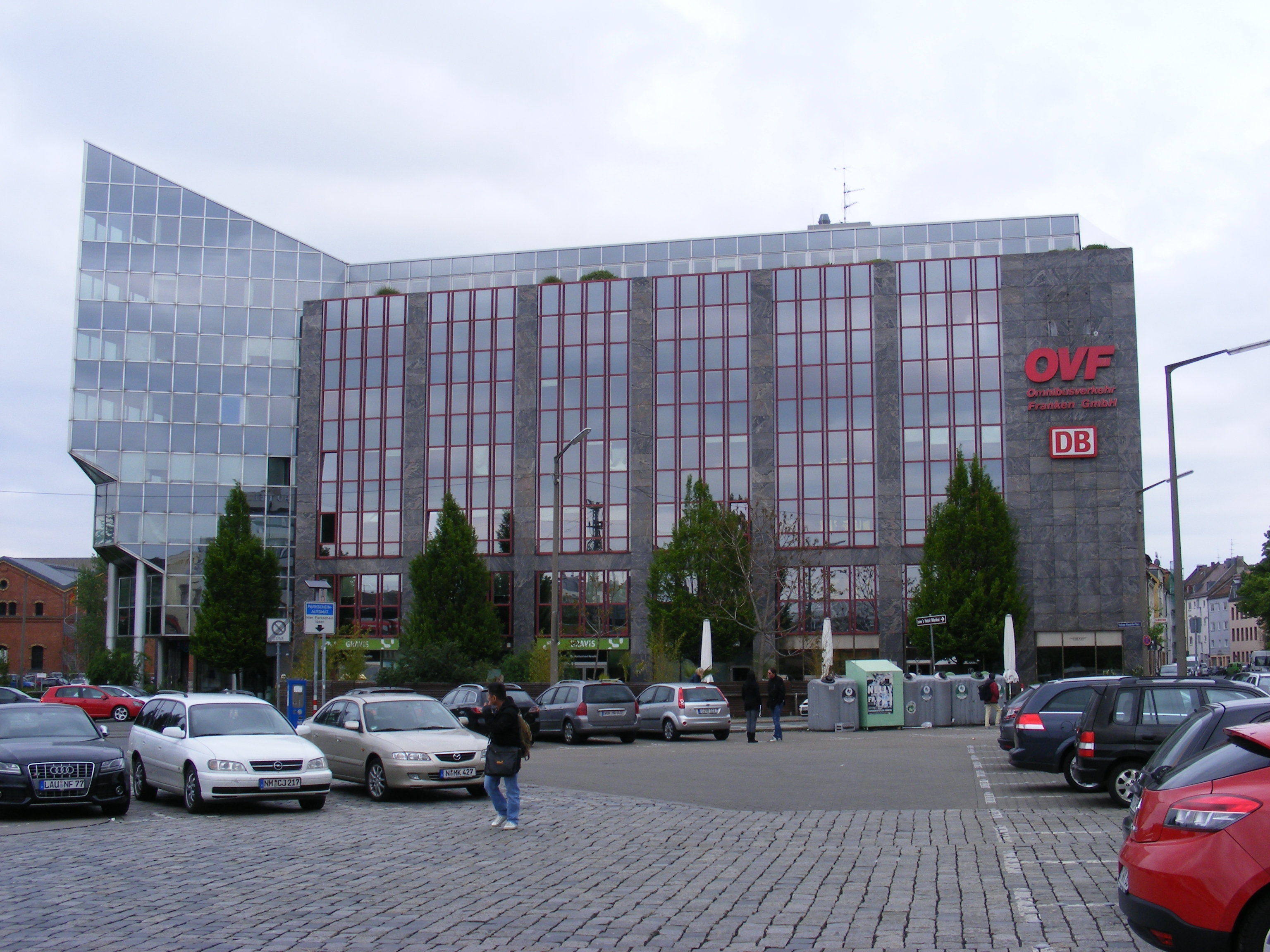 90443 Nürnberg, Neslon-Mandela-Platz 22